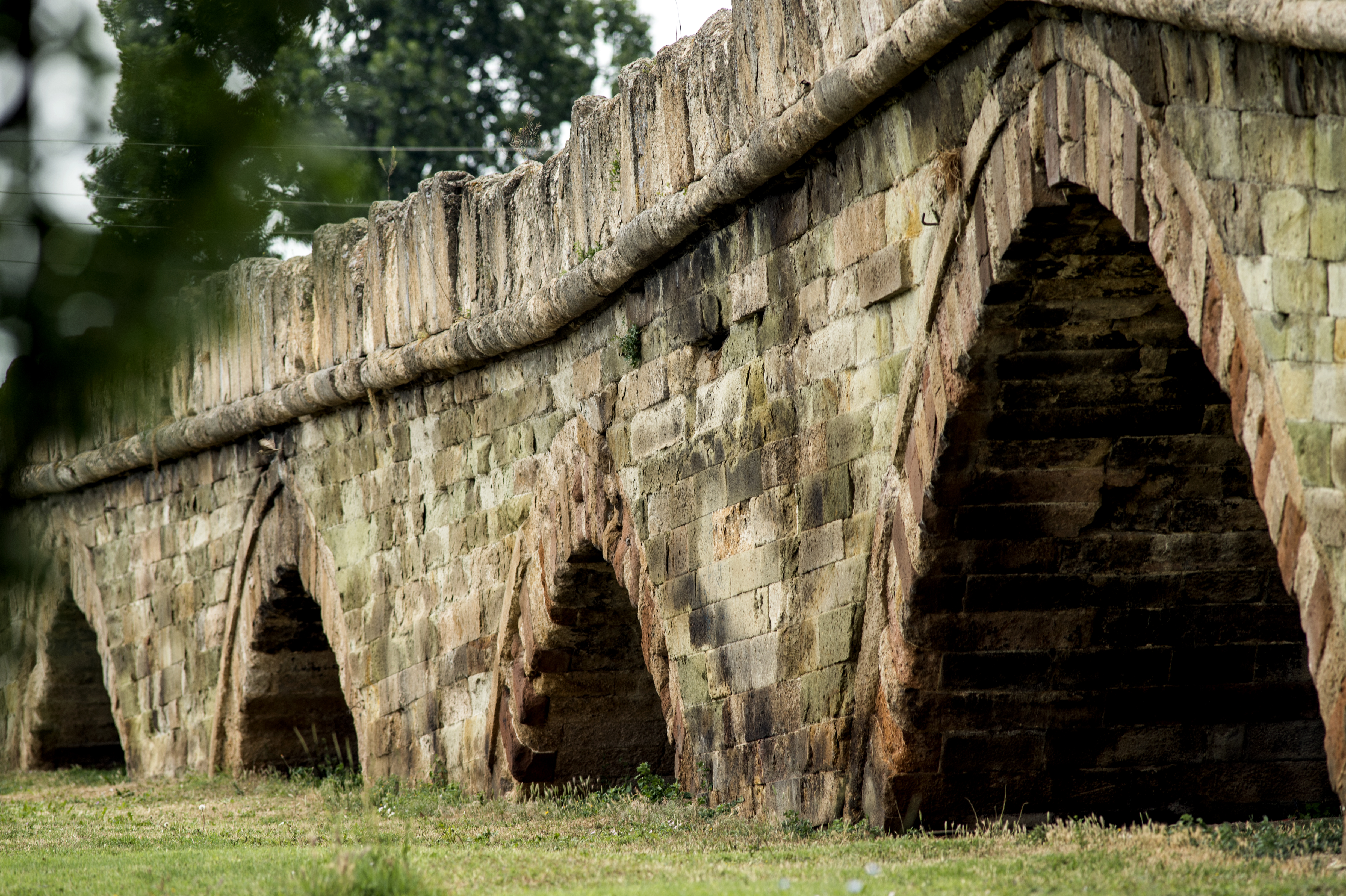 Ura mesjetare me nëntë harqe